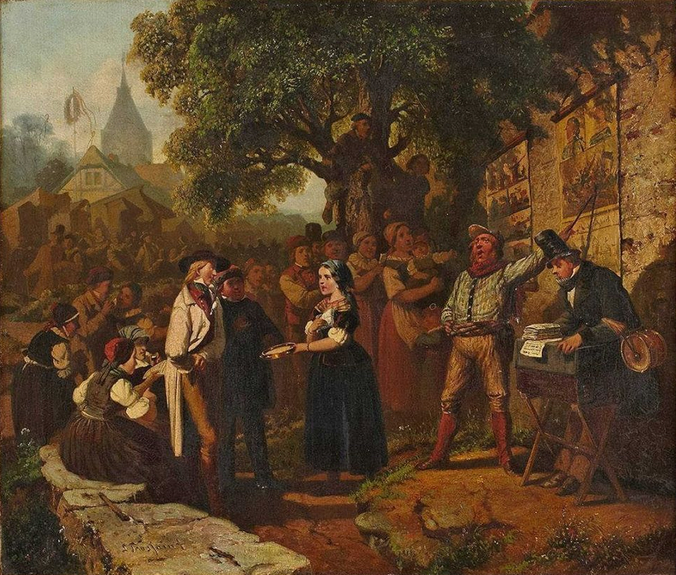 "Hessisches Volksfest", signiert "L. Toussaint", Öl auf Leinwand, 61 x 71 cm